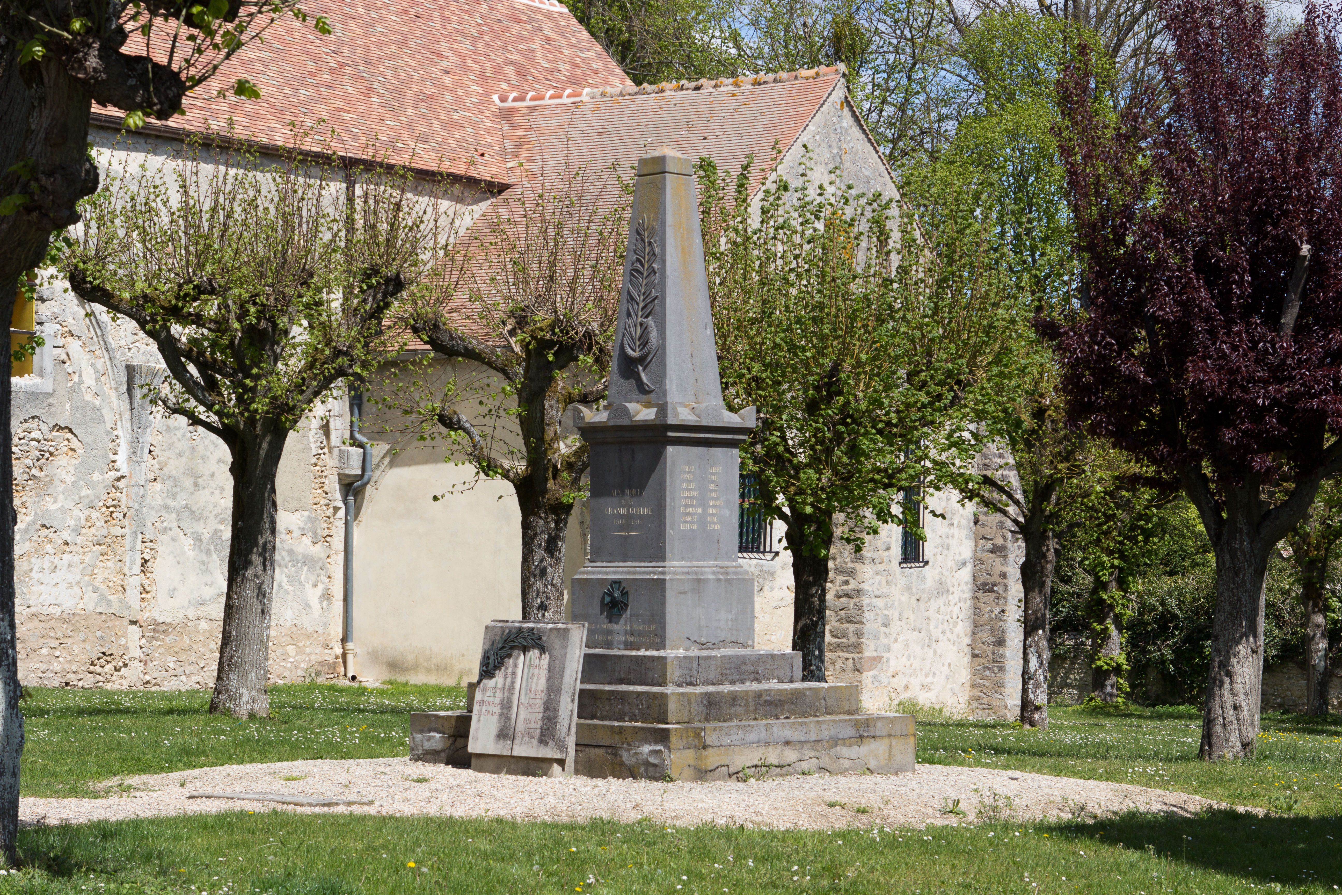 Monument aux mort de D'Huison-Longueville (quartier de D'Huison), département de l'Essonne, France.